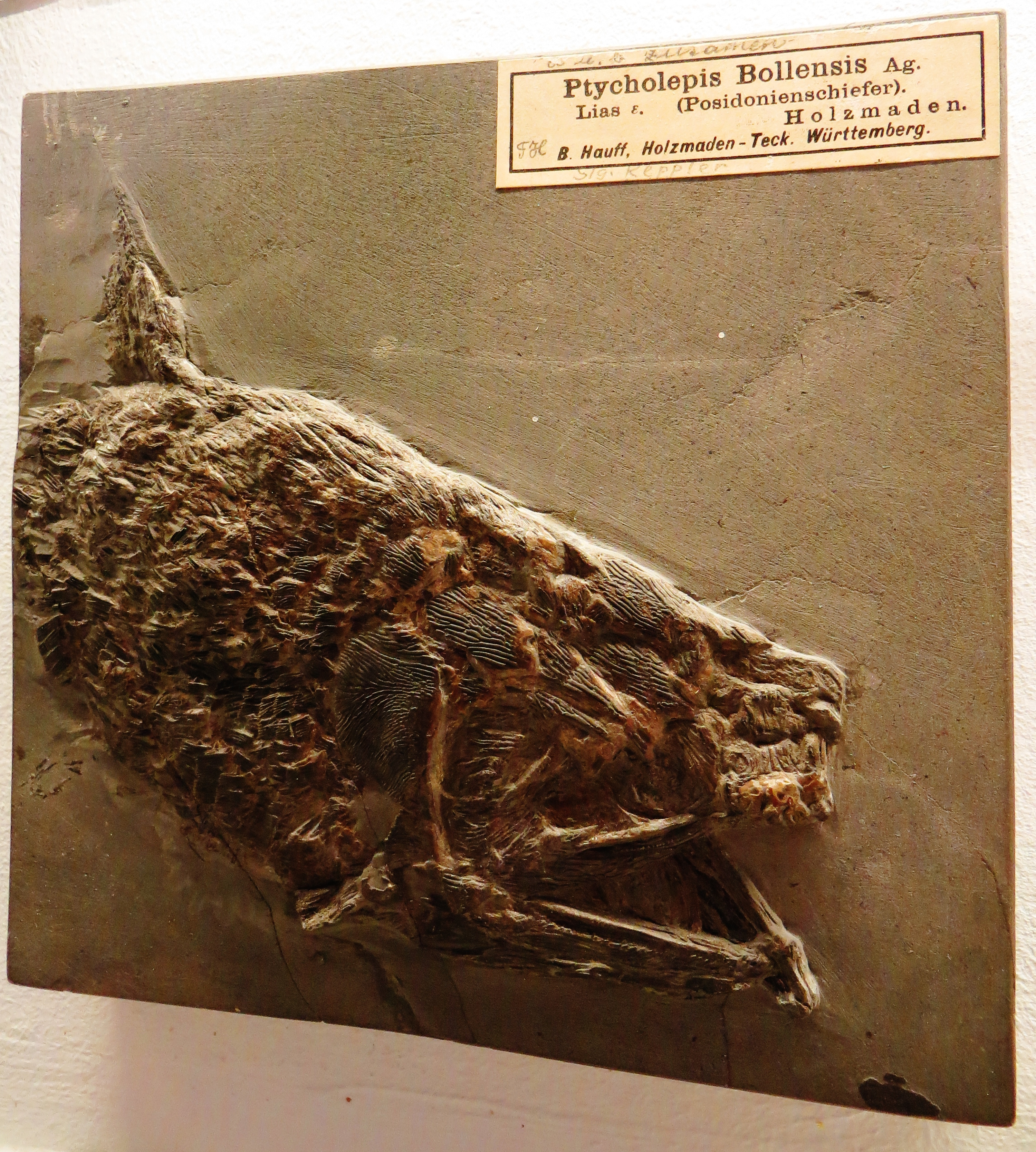 Fossil of Ptycholepis, an extinct fish- Took the picture at Museum of Paleontology, Tuebingen